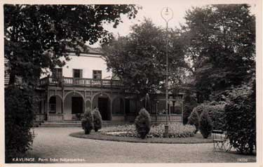 Folkets Hus Kävlinge 1930-tal Fri licens